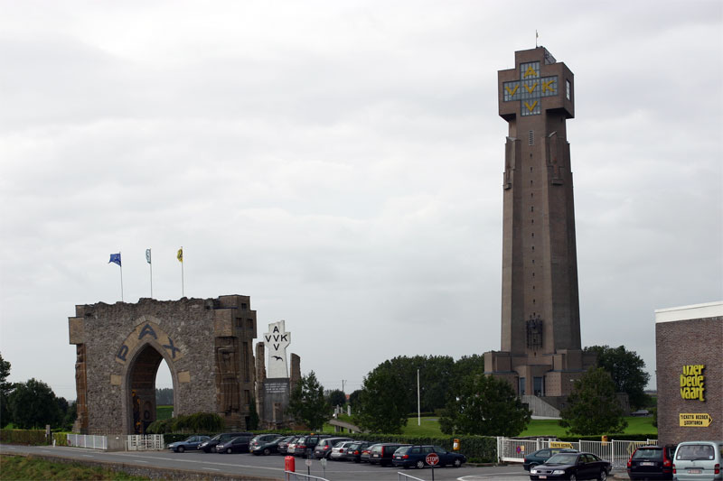 Eigen foto / IJzertoren, hiermee onder GFDL gebracht